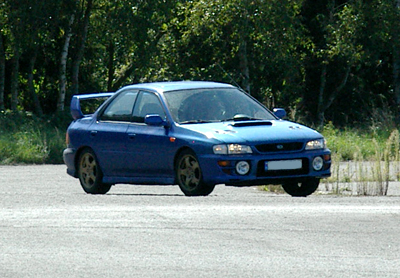 Subaru Impreza GT '98 ('99 look).